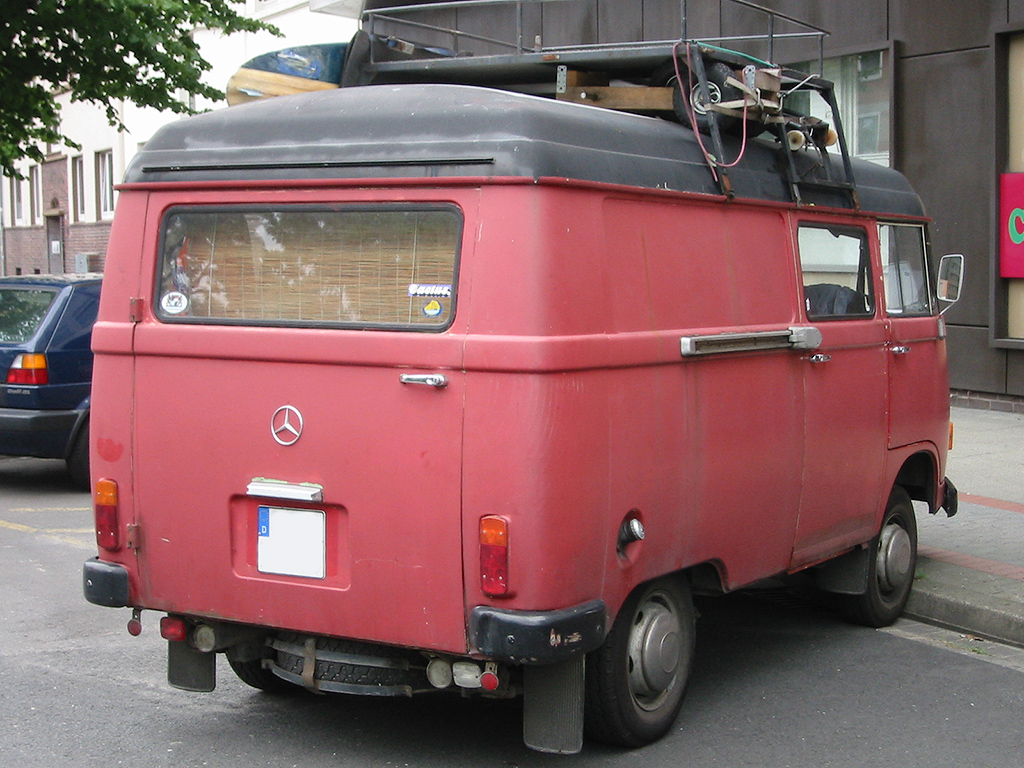 Harburger Transporter